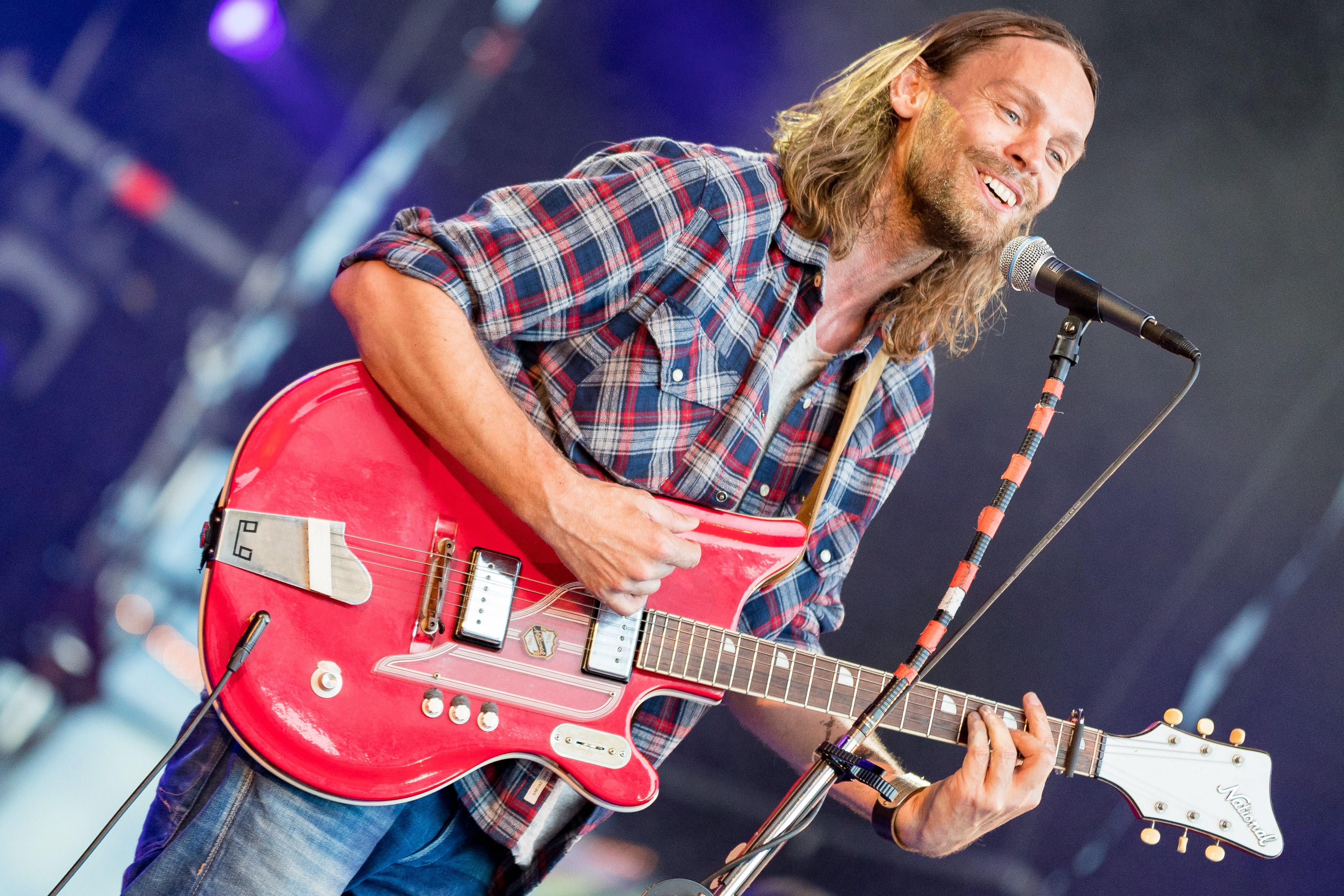 Ingo Pohlmann during Schlossgrabenfest at , Darmstadt, Hessen, Germany on 2017-05-26, Photo: Sven Mandel